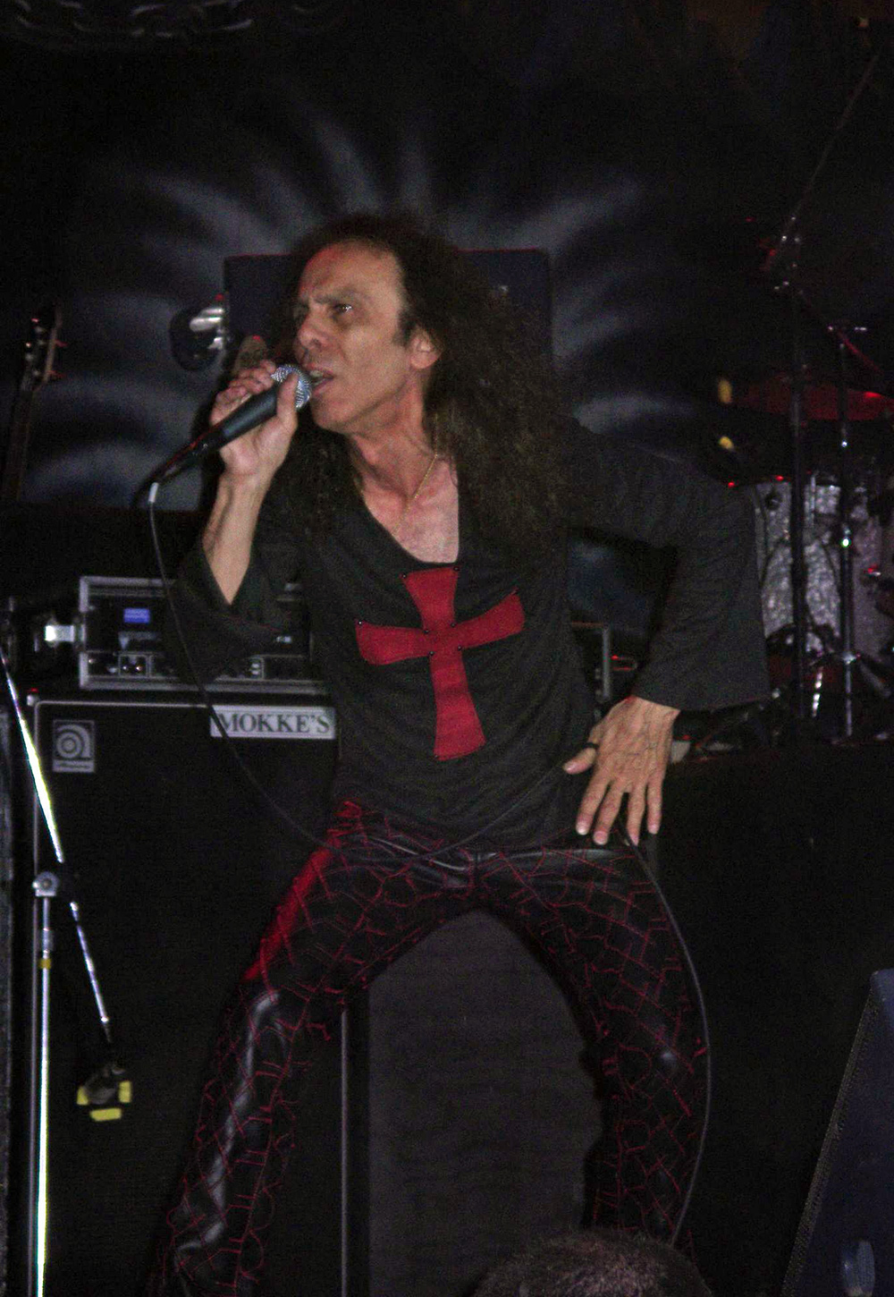 Ronnie Dio at IronFest, 2005